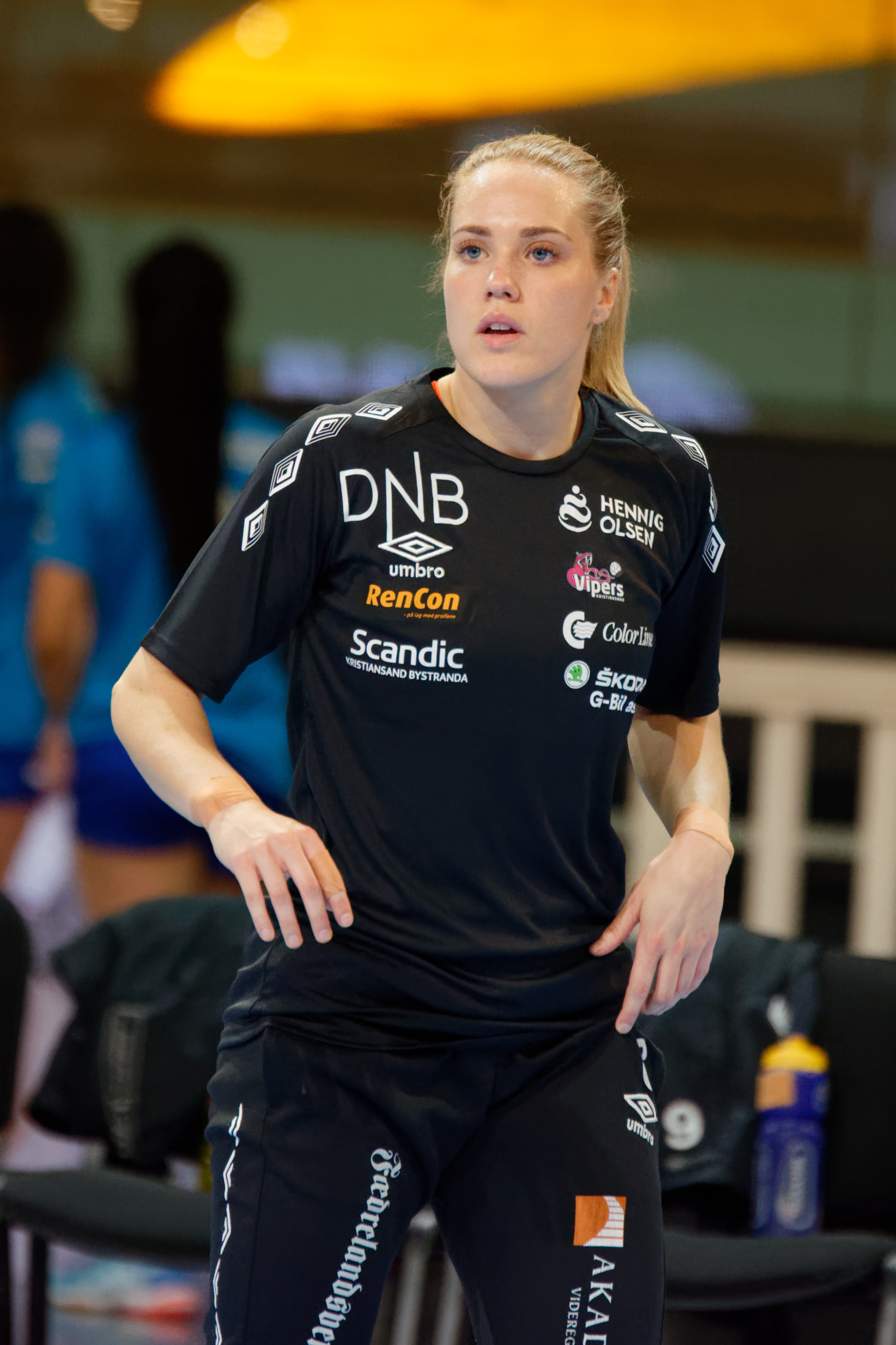 Rencontre du tour principal de coupe EHF entre Issy Paris Hand et les norvégiennes de Vipers Kristiansand au vélodrome de Saint-Quentin en Yvelines, le 03 février 2018.